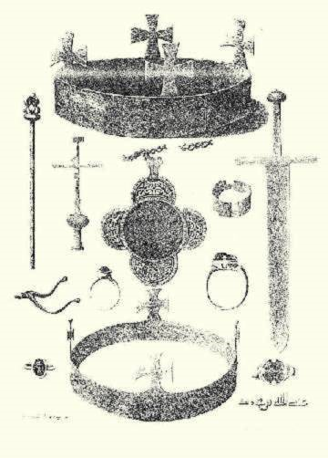 Pohřební klenoty Bély III a Anežky z Antiochie